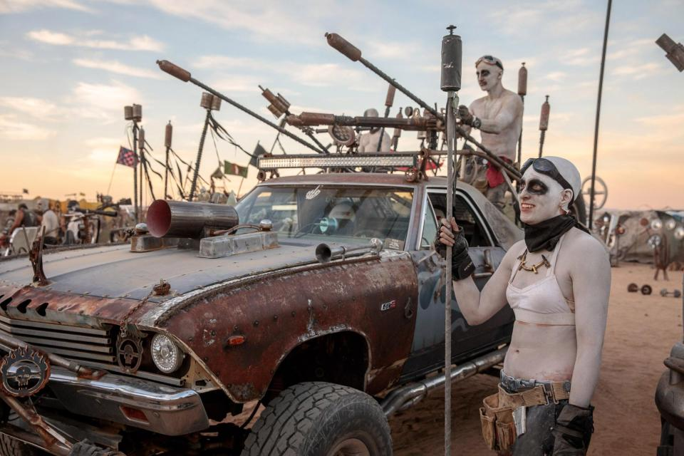 Το πιο τρελό μουσικό φεστιβάλ στον κόσμο